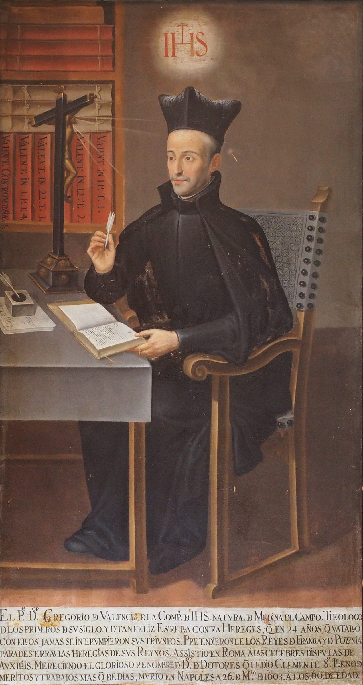 Retrato del jesuita y teólogo español Gregorio de Valencia (1549-1603). Se conserva en la iglesia de San Miguel y San Julián de Valladolid, (España).